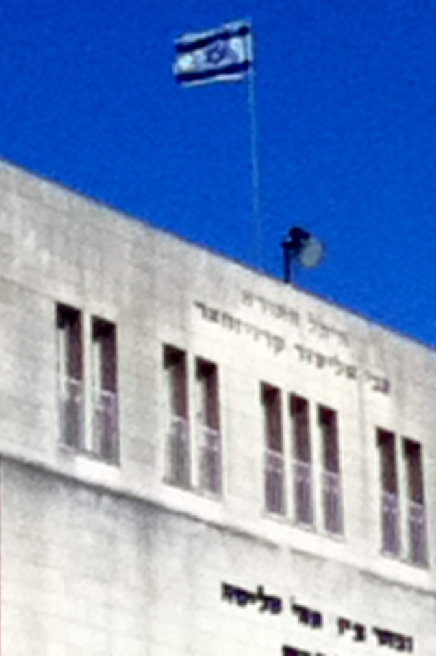 הדגל שעל ישיבת פוניבז'.